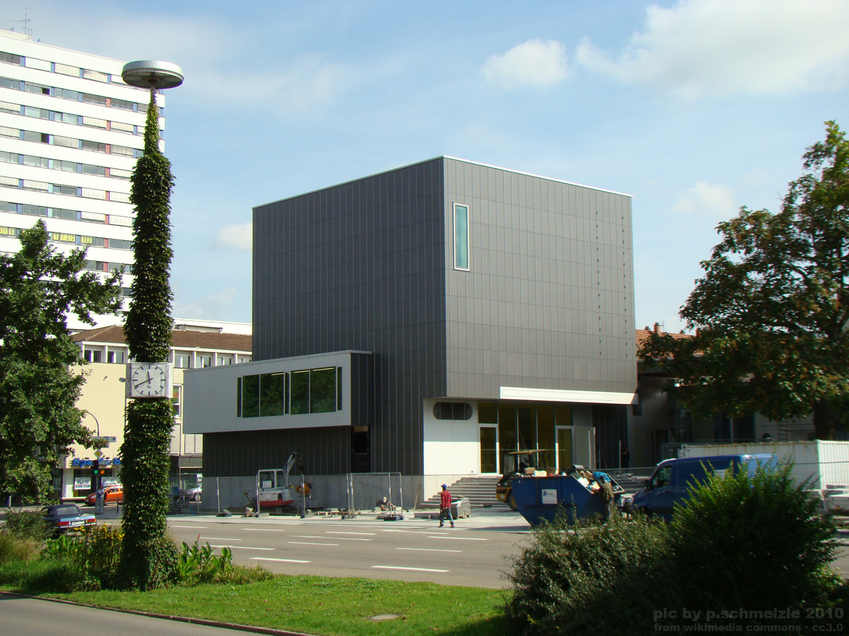 Kunsthalle Vogelmann an der Harmonie in Heilbronn, September 2010, kurz vor Fertigstellung.